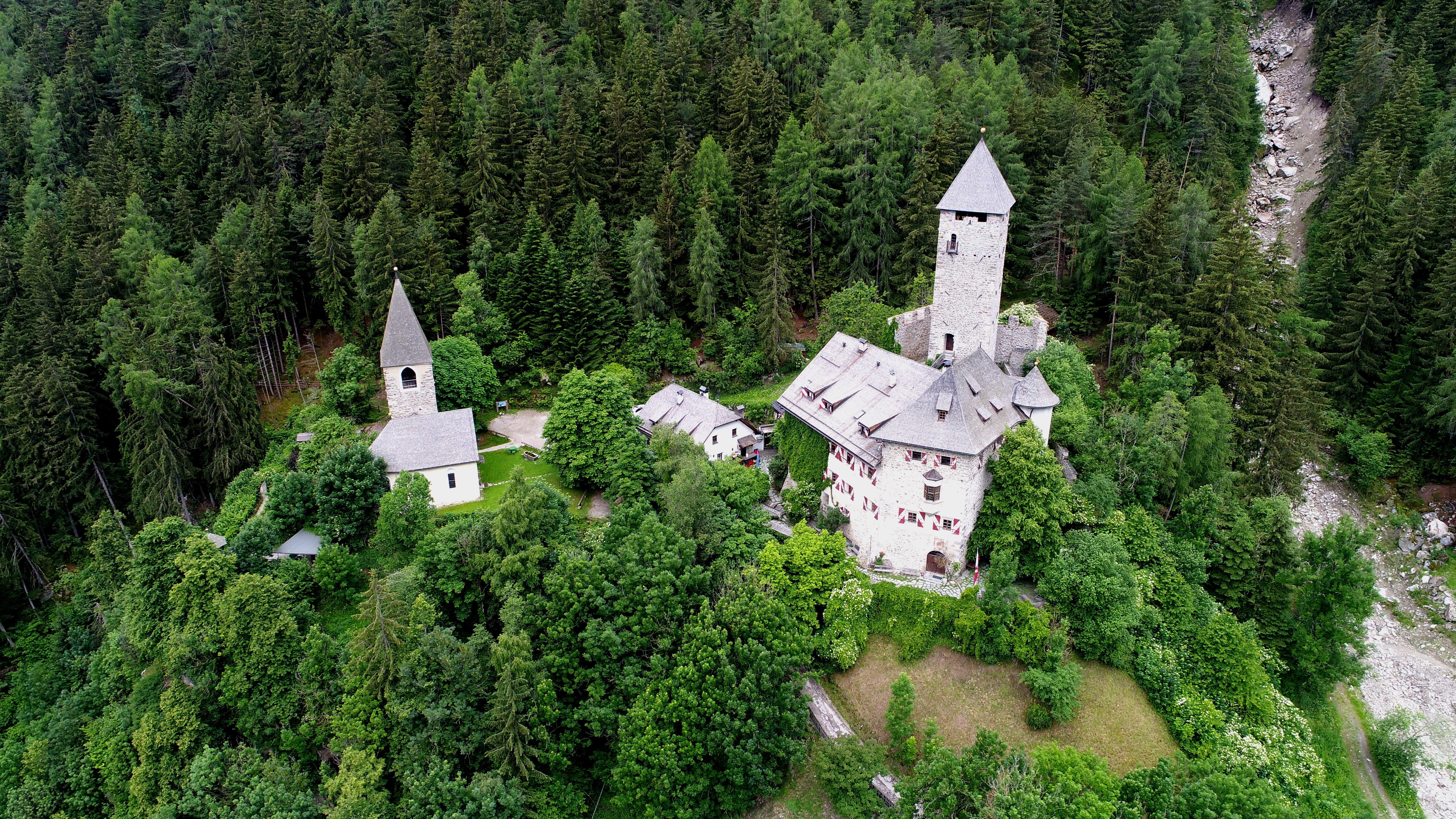 Burg Neuhaus (Gais) aus der Vogelperspektive (2018)